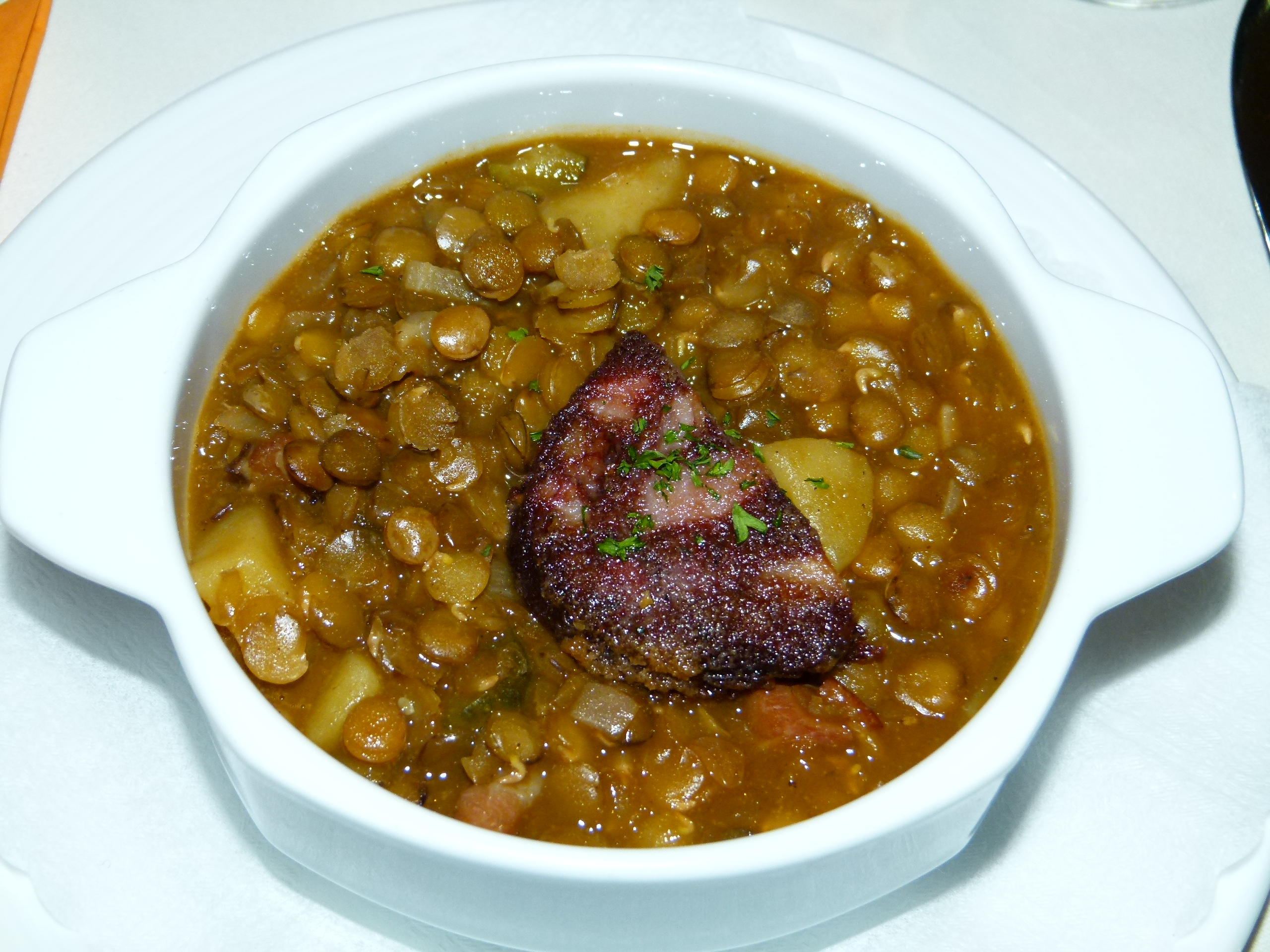 Linseneintopf mit Blutwurst, Waldhotel am Aschergraben, Geising